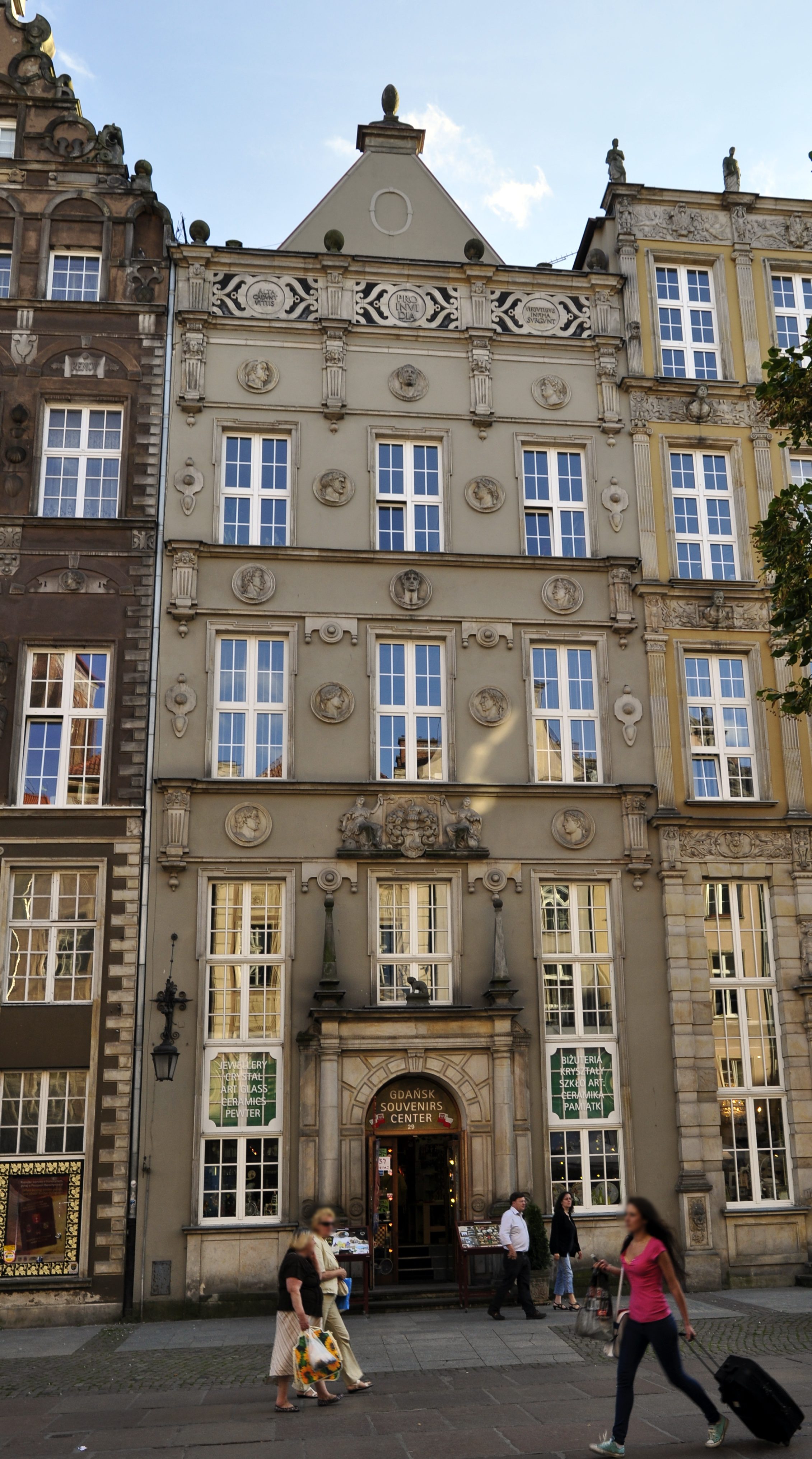 dom, kamienica Czirenbergów, Gdańsk, ul. Długa 29